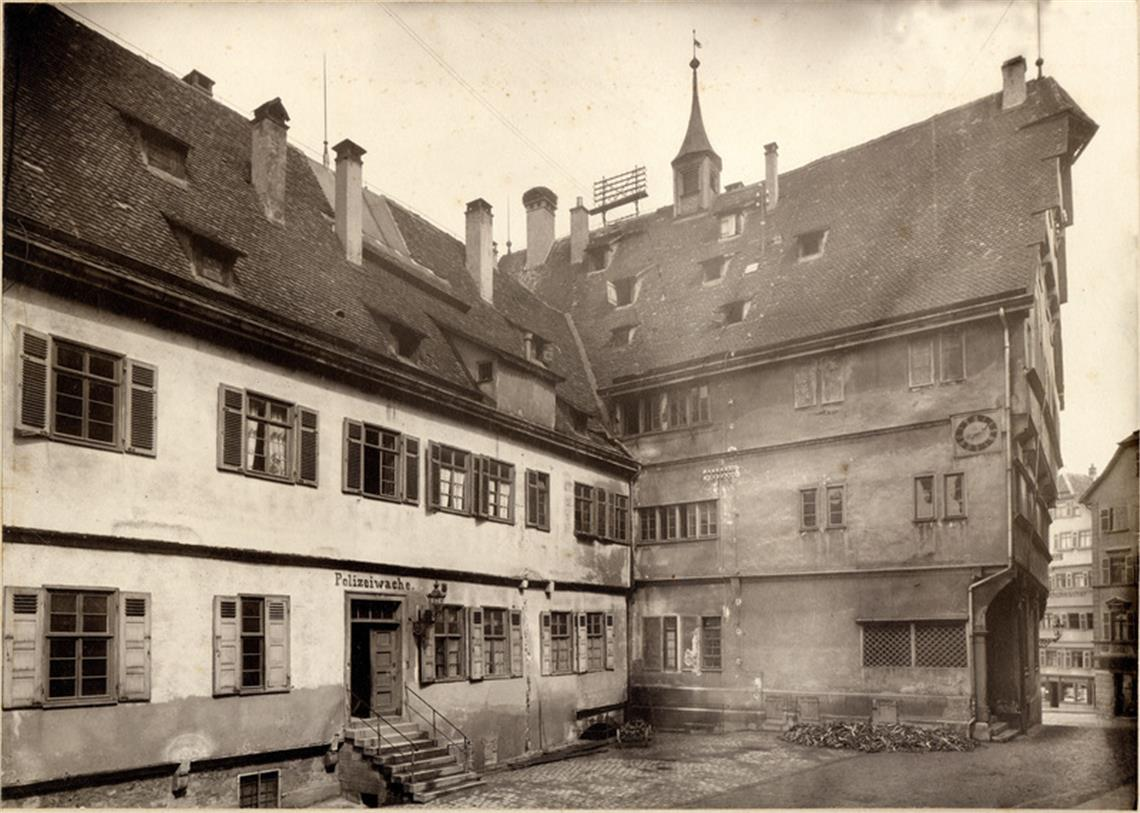 Tübinger Rathaus von hinten (Haaggasse). 1907 wurde der hintere Erweiterungsbau, in dem die Polizeiwache untergebracht war, abgerissen. Das Foto entstand direkt vor dem Beginn der Abbrucharbeiten.